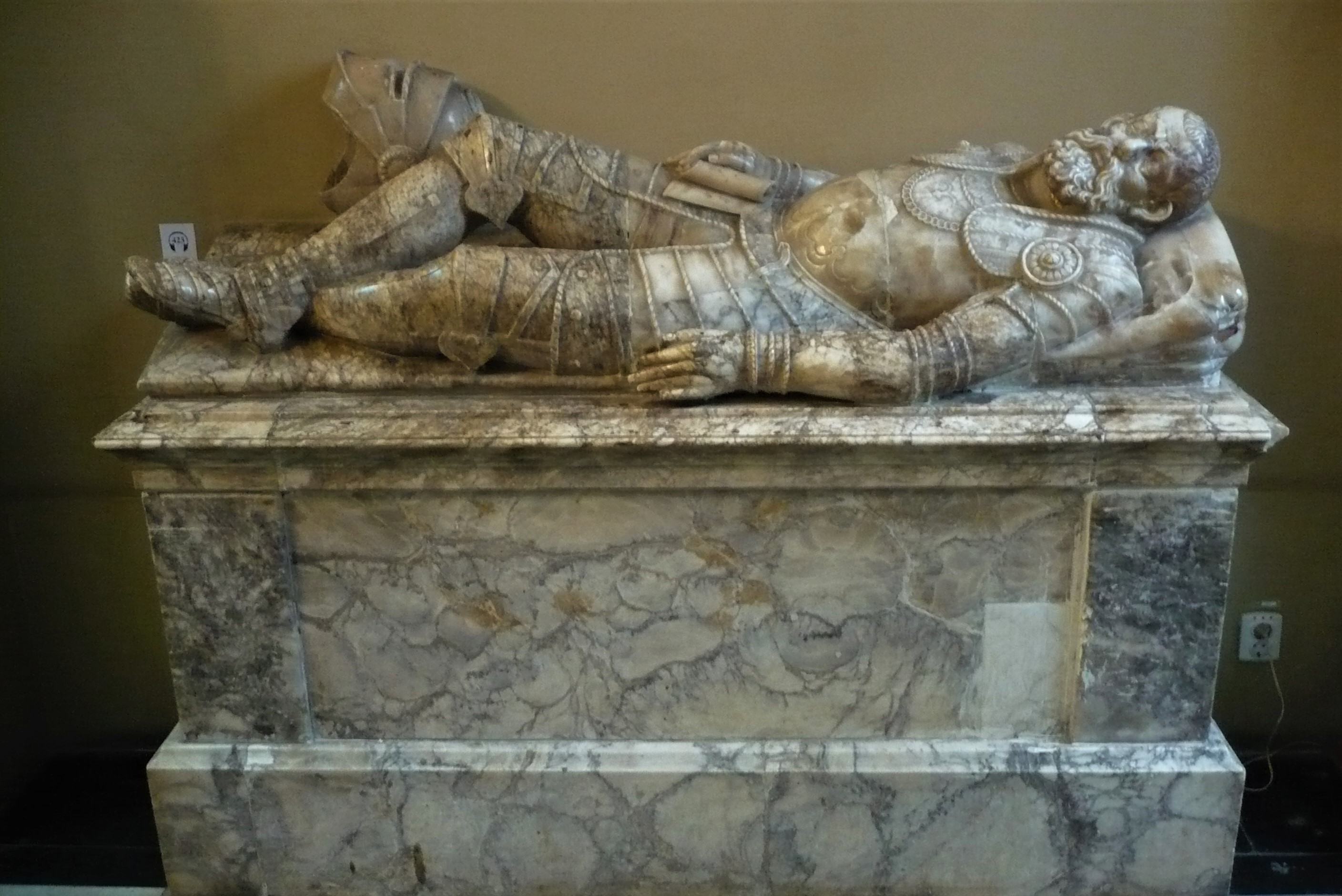 Nagrobek Jana Swoszowskiego w klasztorze dominikanów we Lwowie.